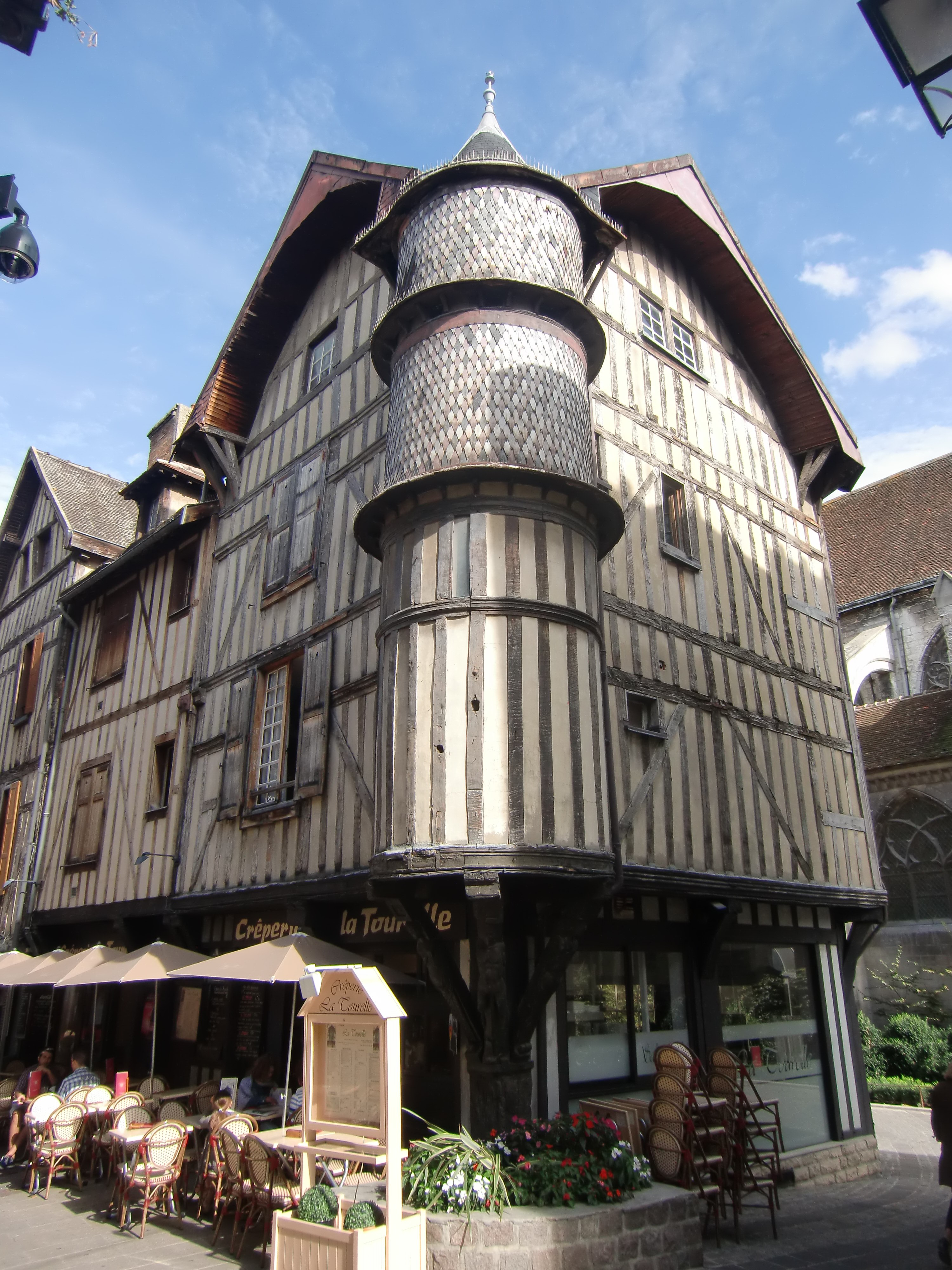 Maison de l'Orfèvre à Troyes (Aube, Champagne, France)